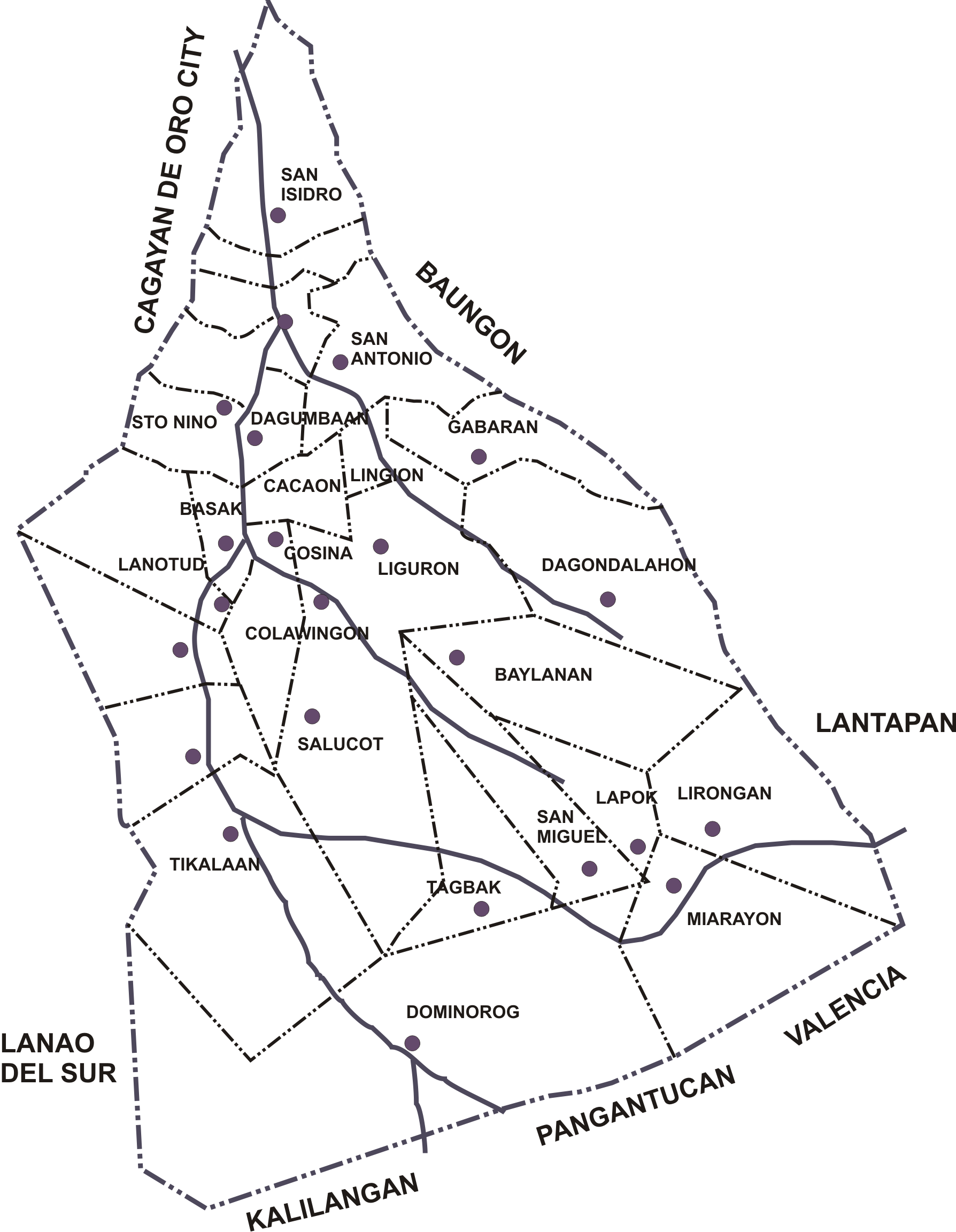 Political map of Talakag, Bukidnon